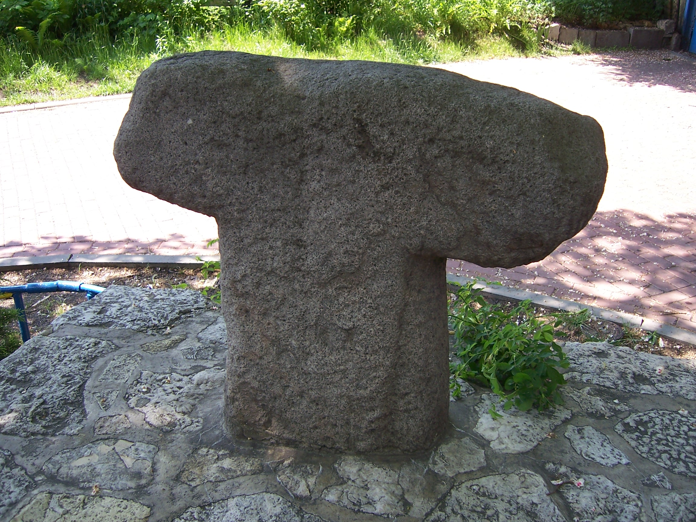 Monolitowy krzyż kamienny w Łagiewnikach (dzielnica Bytomia).